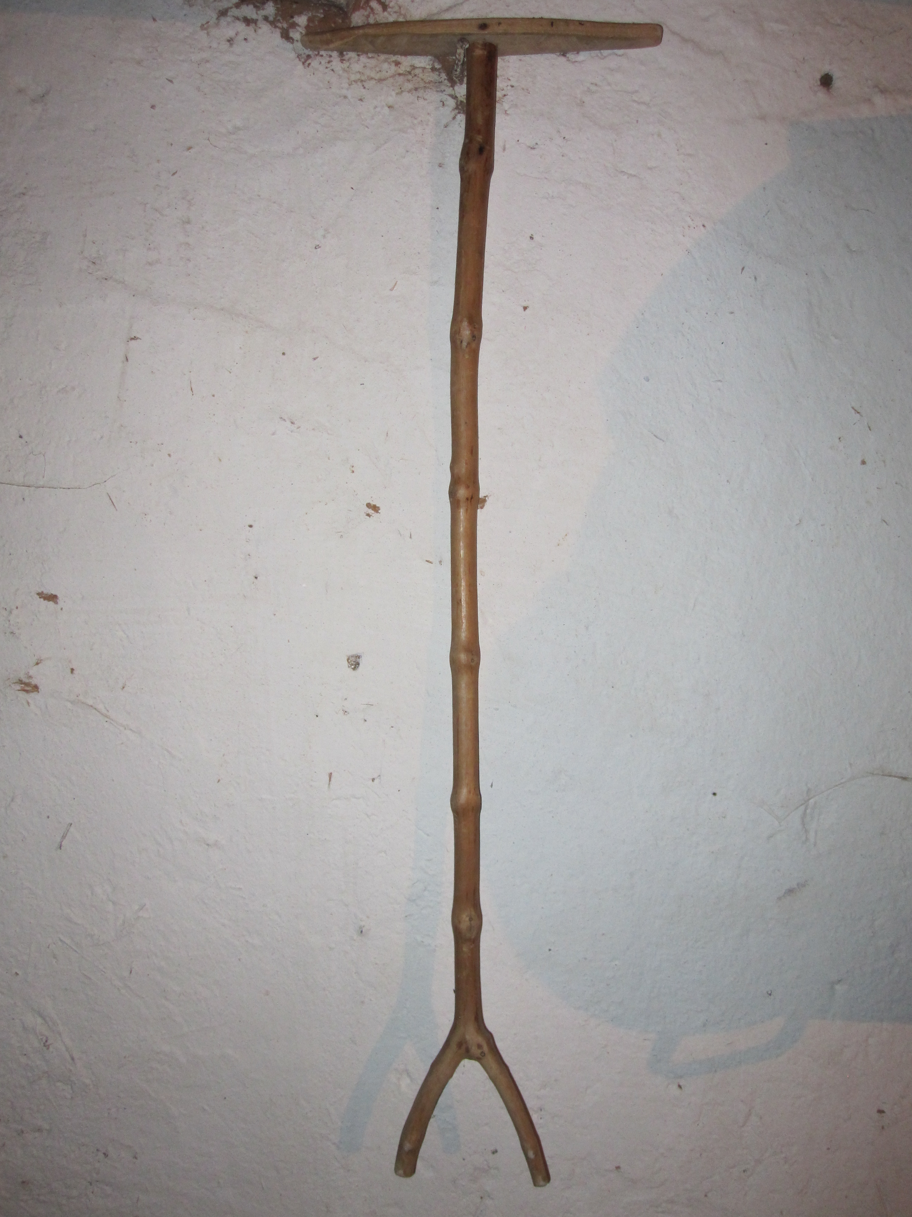 Аршин е дрвен предмет за мерење на должина (го користеле за мерење при ткаење). 1 аршин = 0,7112 м